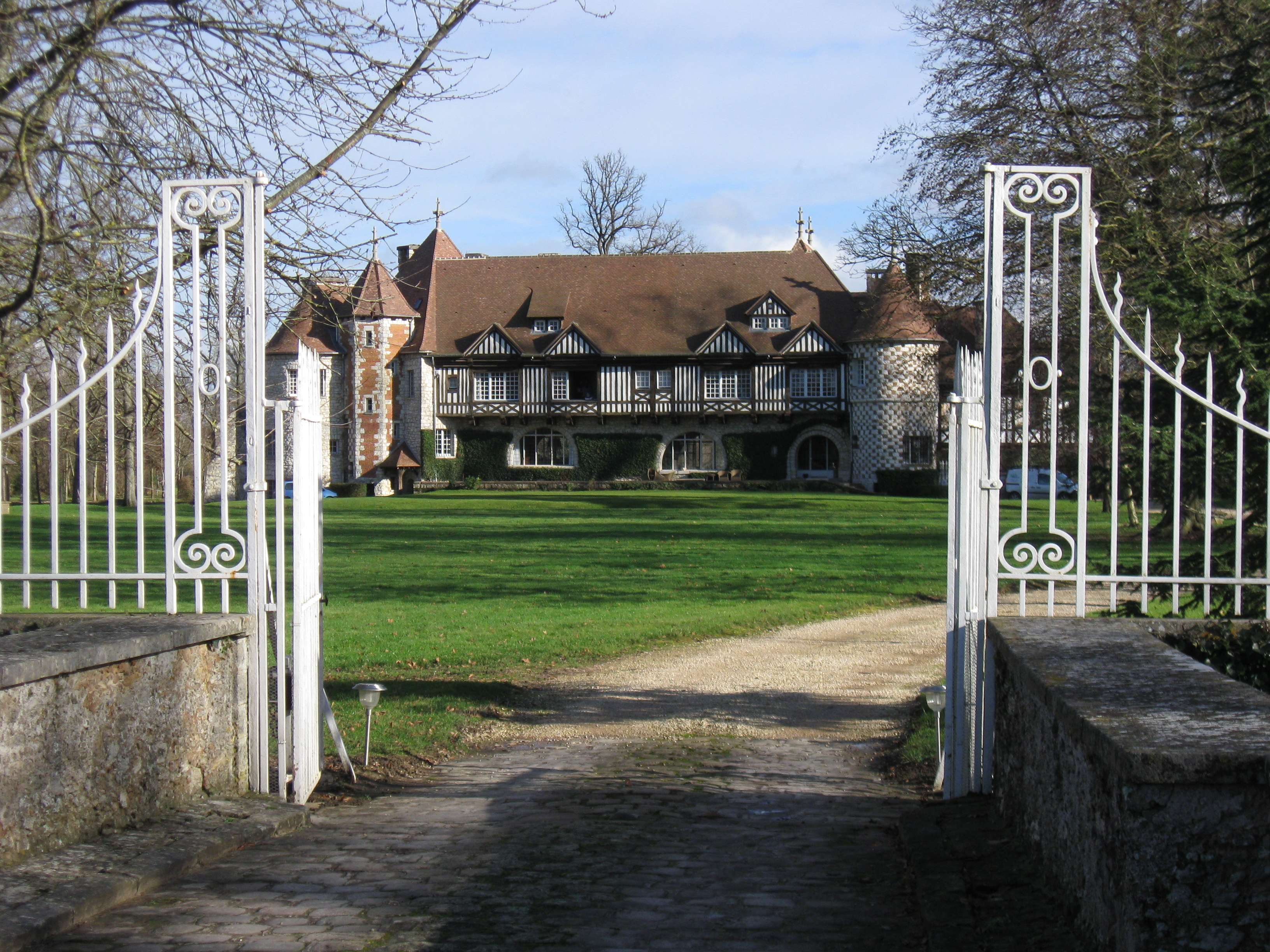 Manoir de Beaumarchais, Les Chapelles-Bourbon. (Seine-et-Marne, région Île-de-France).